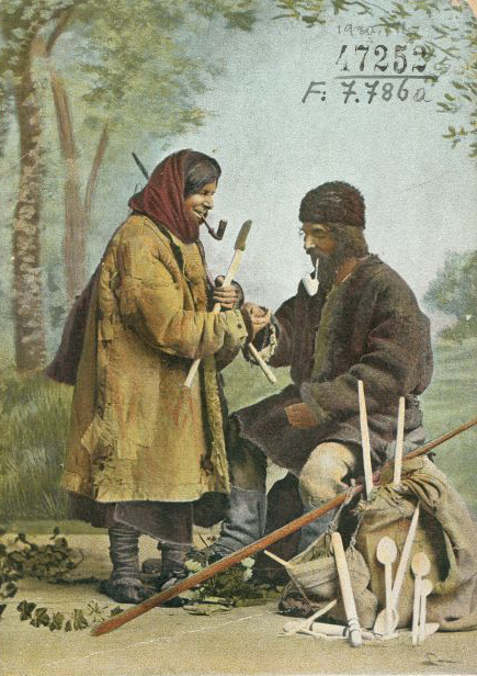 Bayaches de Transylvanie faiseurs de cuillères et les colportant, en halte sur la route